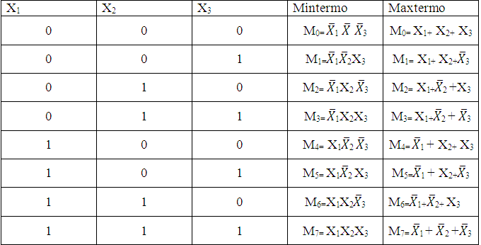 Tabela verdade contendo três variáveis para a comparação das funções Mintermo e Maxtermo.